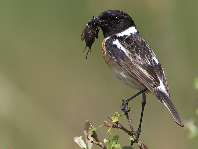 Roodborsttapuit Saxicola rubicola met vrouwelijke Veldkrekel